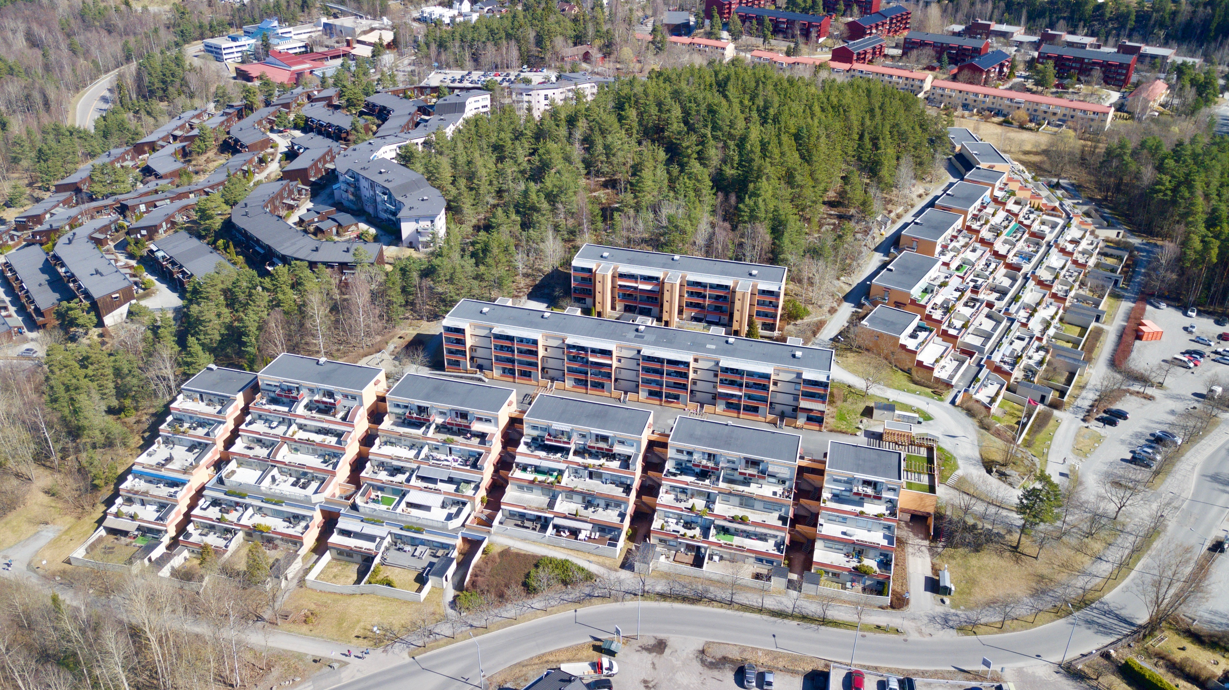 Ravnåsveien, Hallagerbakken. Holmlia i Oslo.